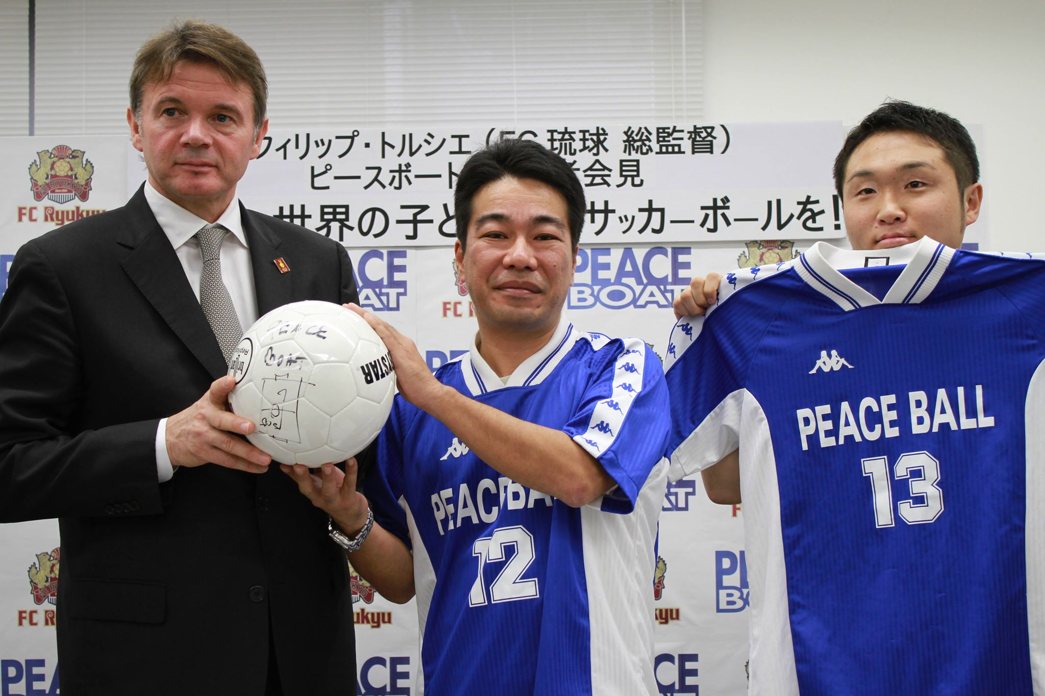 サイン入りボール、オリジナルユニフォームを持つフィリップ・トルシエ元日本代表監督とピースボート職員。新宿区高田馬場にて